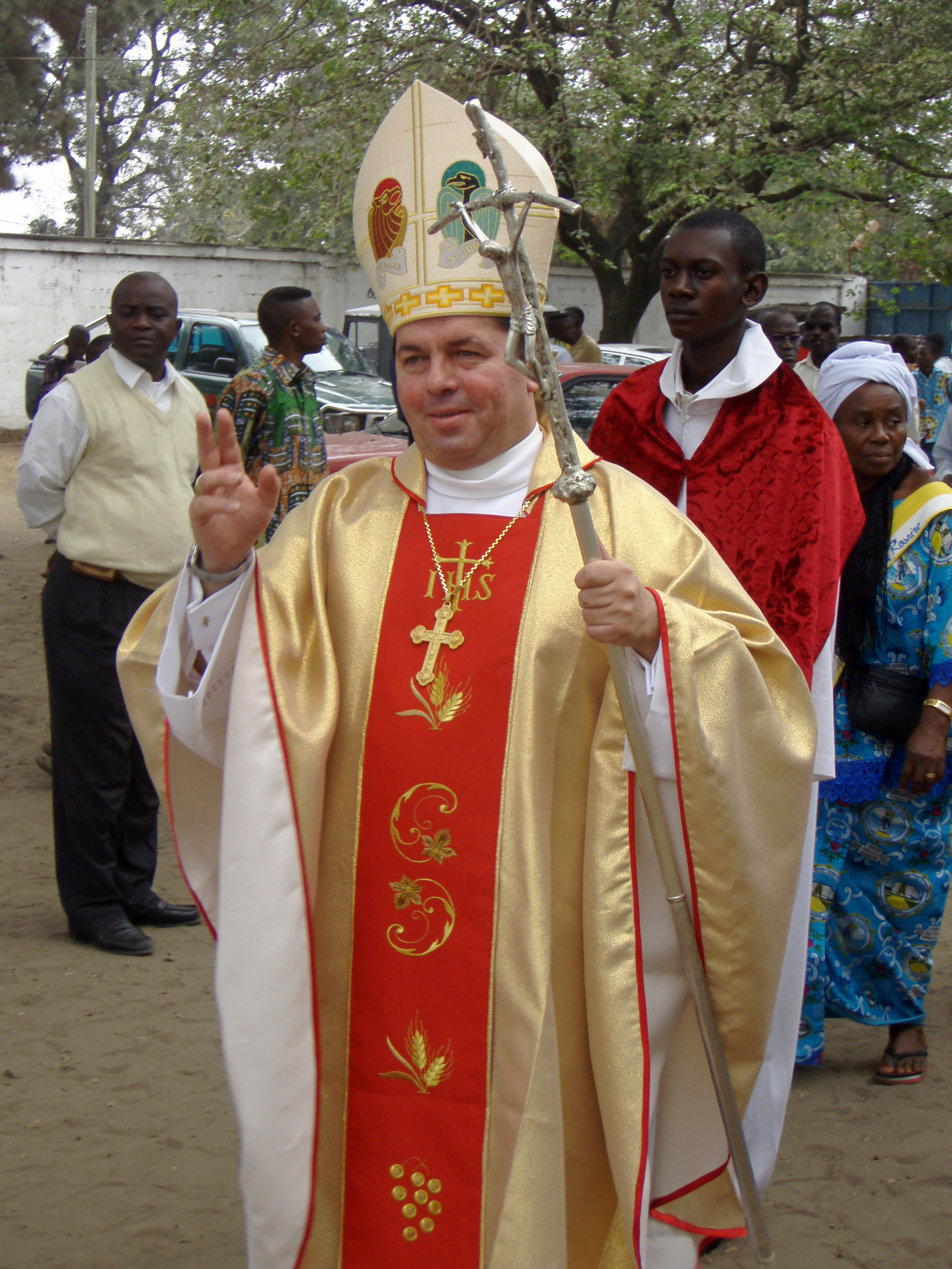 Jan Pawłowski – polski biskup rzymskokatolicki, arcybiskup ad personam, doktor prawa kanonicznego i dyplomata watykański, nuncjusz apostolski w Kongu (Brazzaville) i Gabonie od 2009.